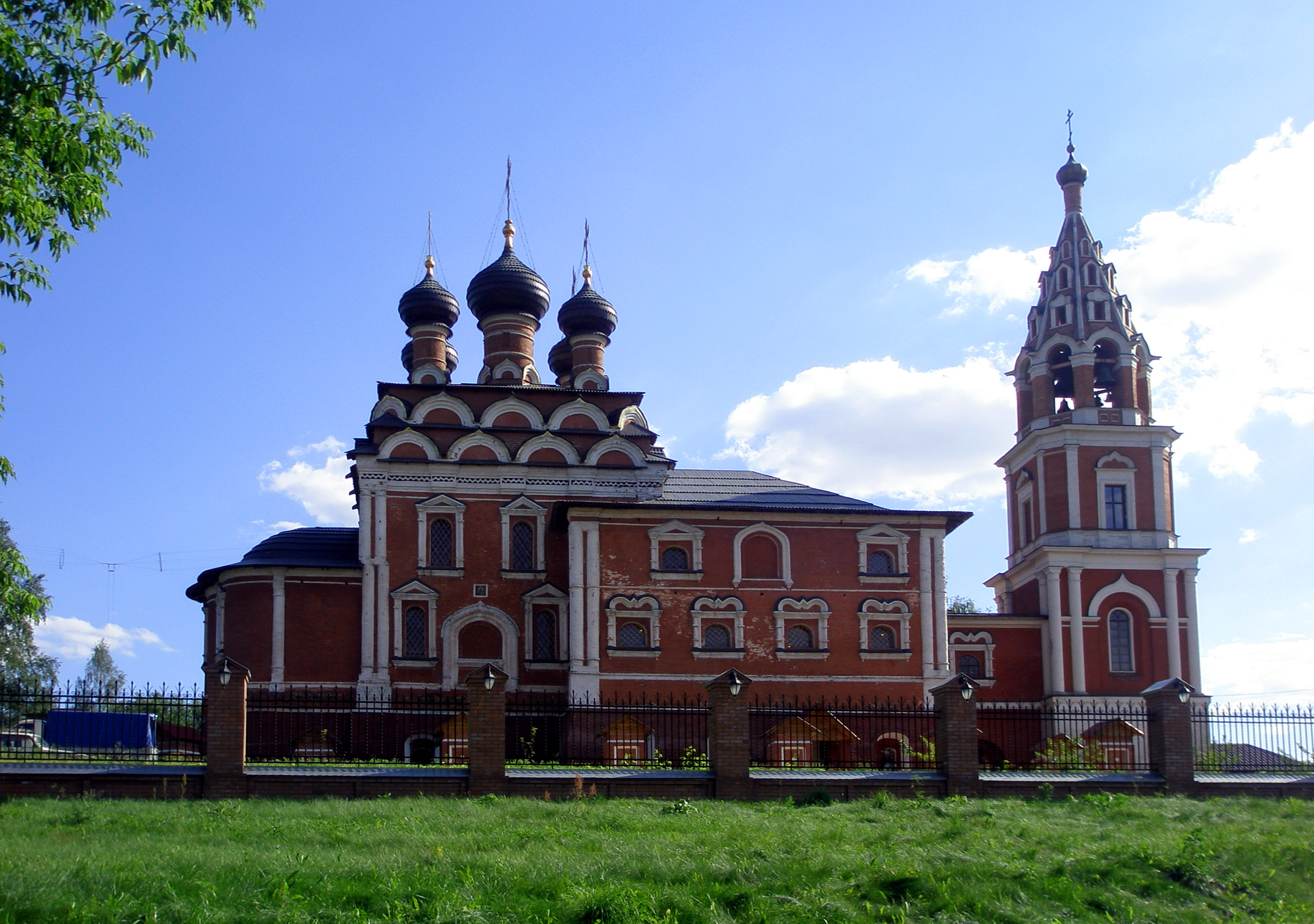 Храм Казанской Иконы Божьей Матери (Московская область, Люберецкий район, город Котельники).